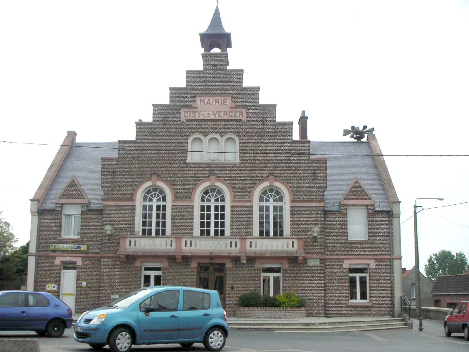 Mairie de Oisy-le-Verger (Pas-de-Calais)